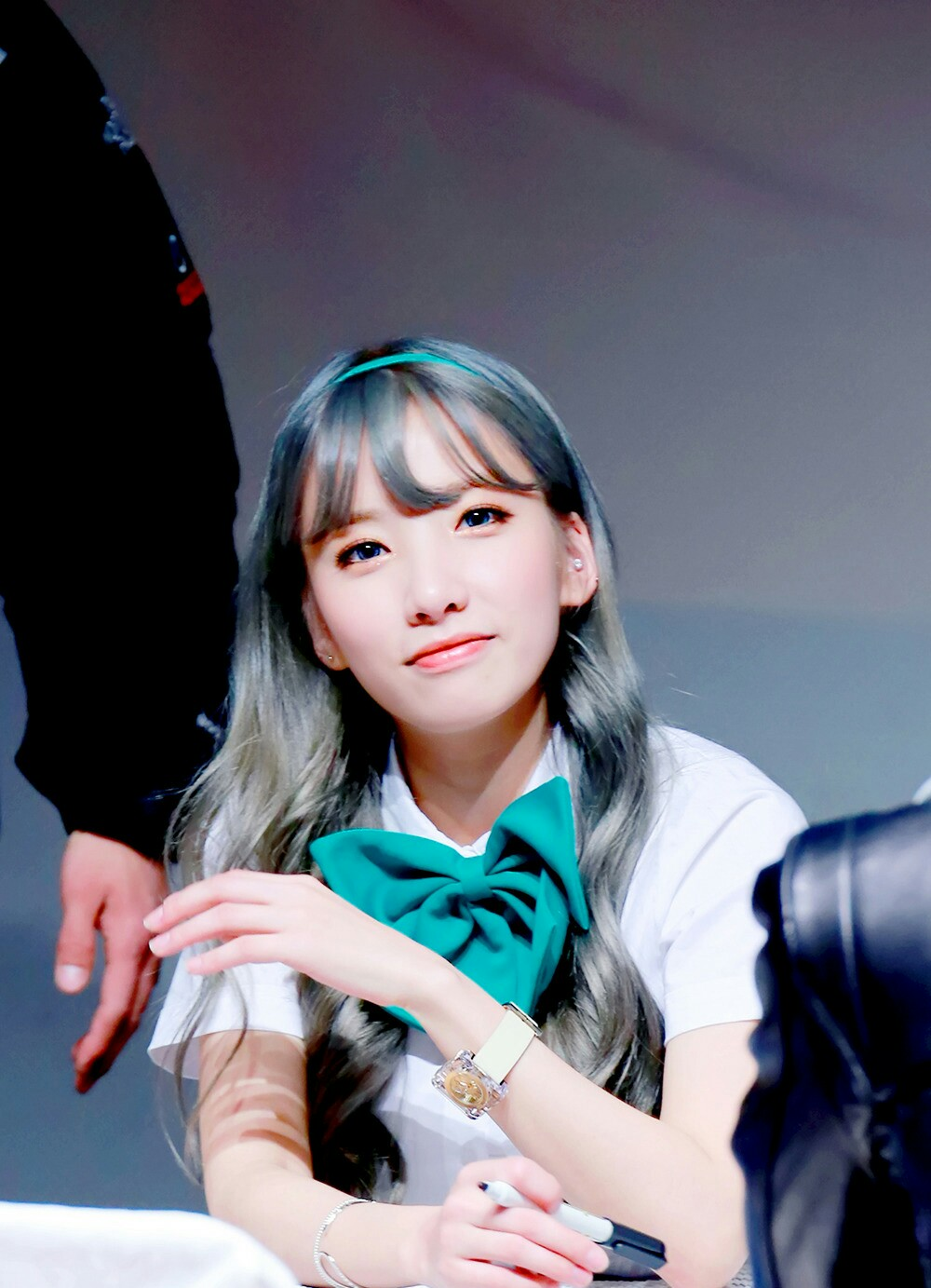 160313 레인보우 신촌 팬싸인회 지숙